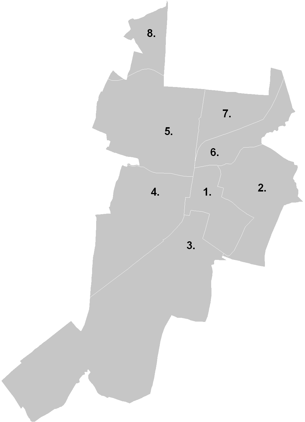 Viertel von Wiener Neustadt